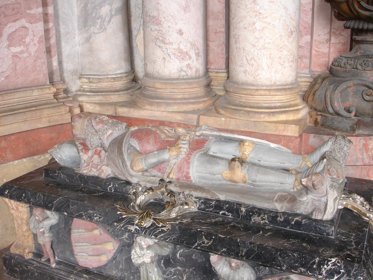 Sarkophag des Herzogs Bolko II. in der Fürstenkapelle von Kloster Grüssau